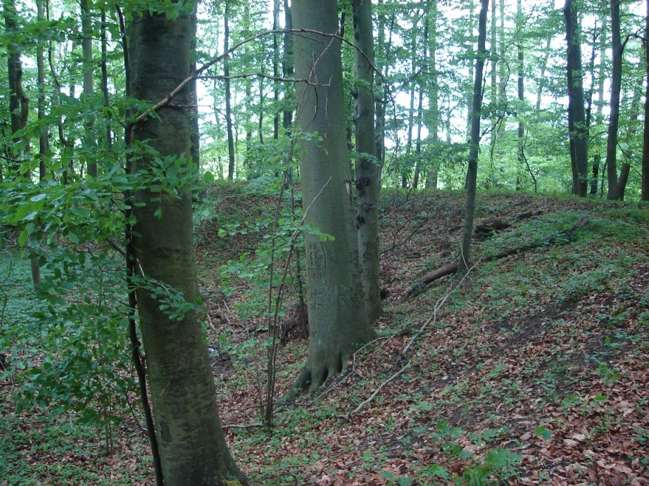 Średniowieczne grodzisko położone w rezerwacie Uroczysko Grodziszcze